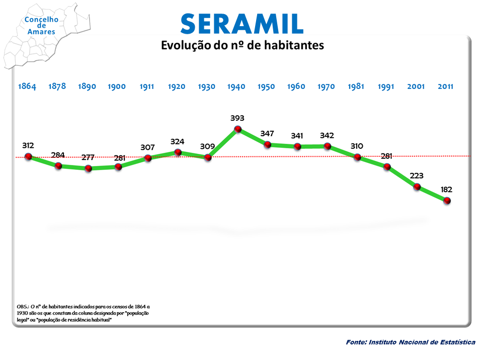 Censo 2011